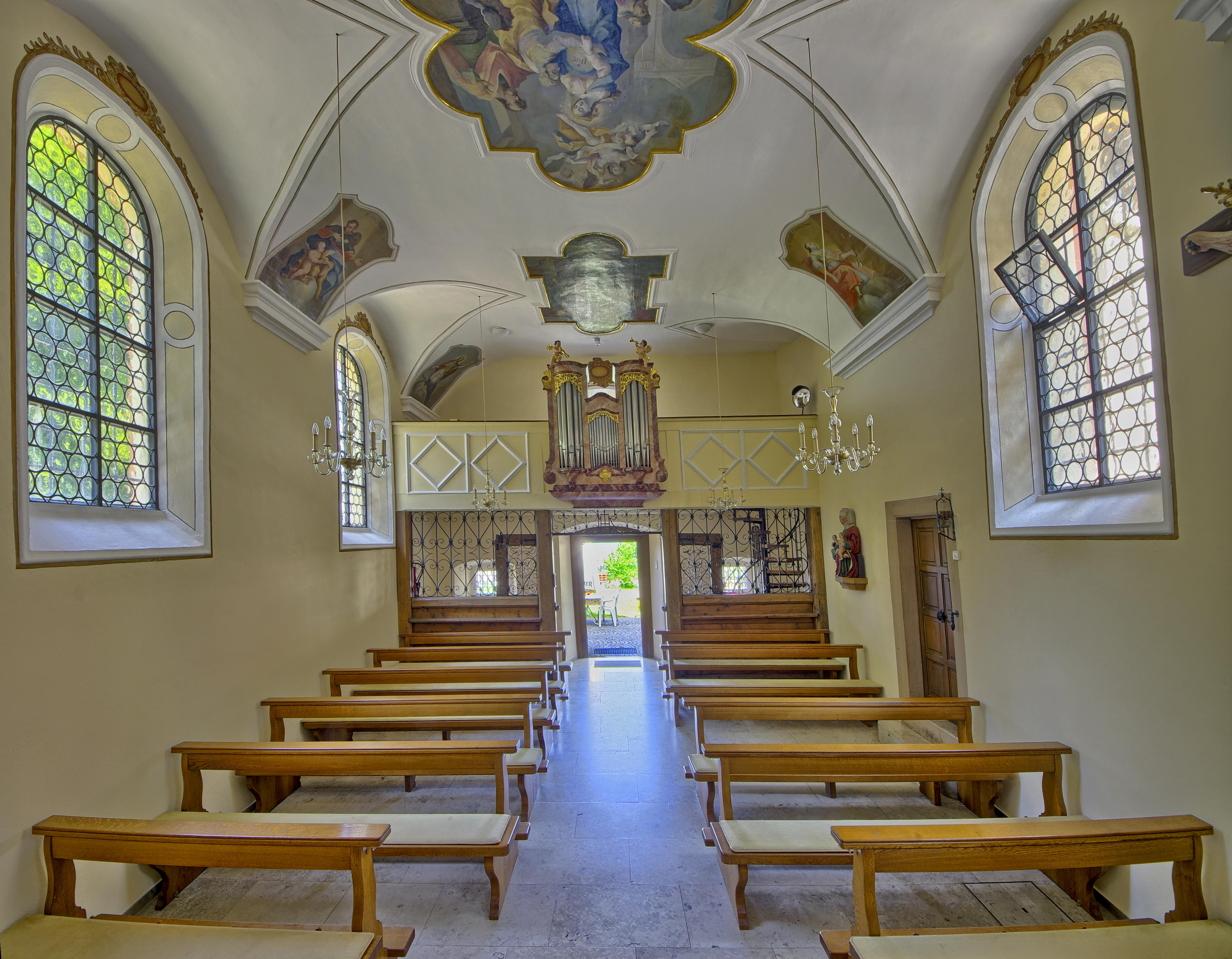 Bilder von der Giersbergkapelle